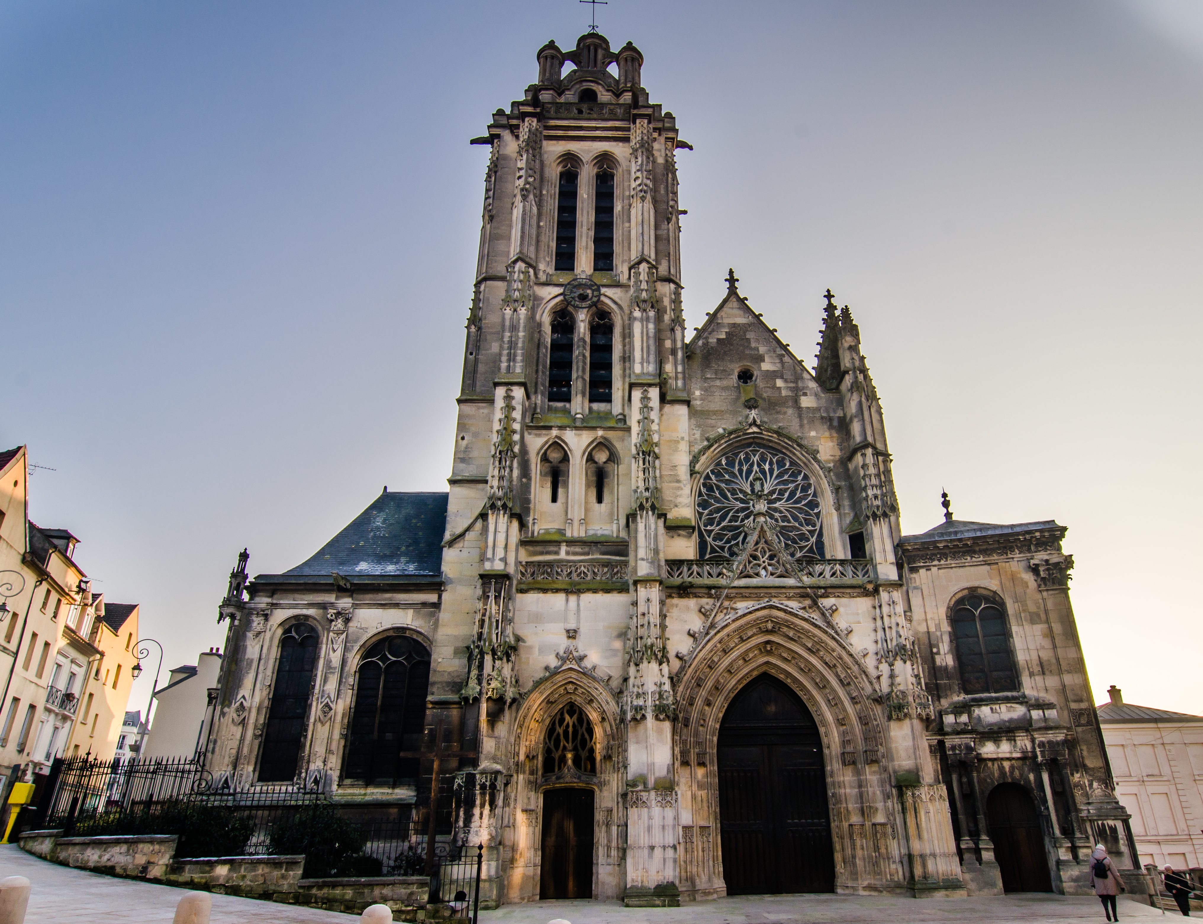 Entrée de la cathédrale Saint Maclou de Pontoise